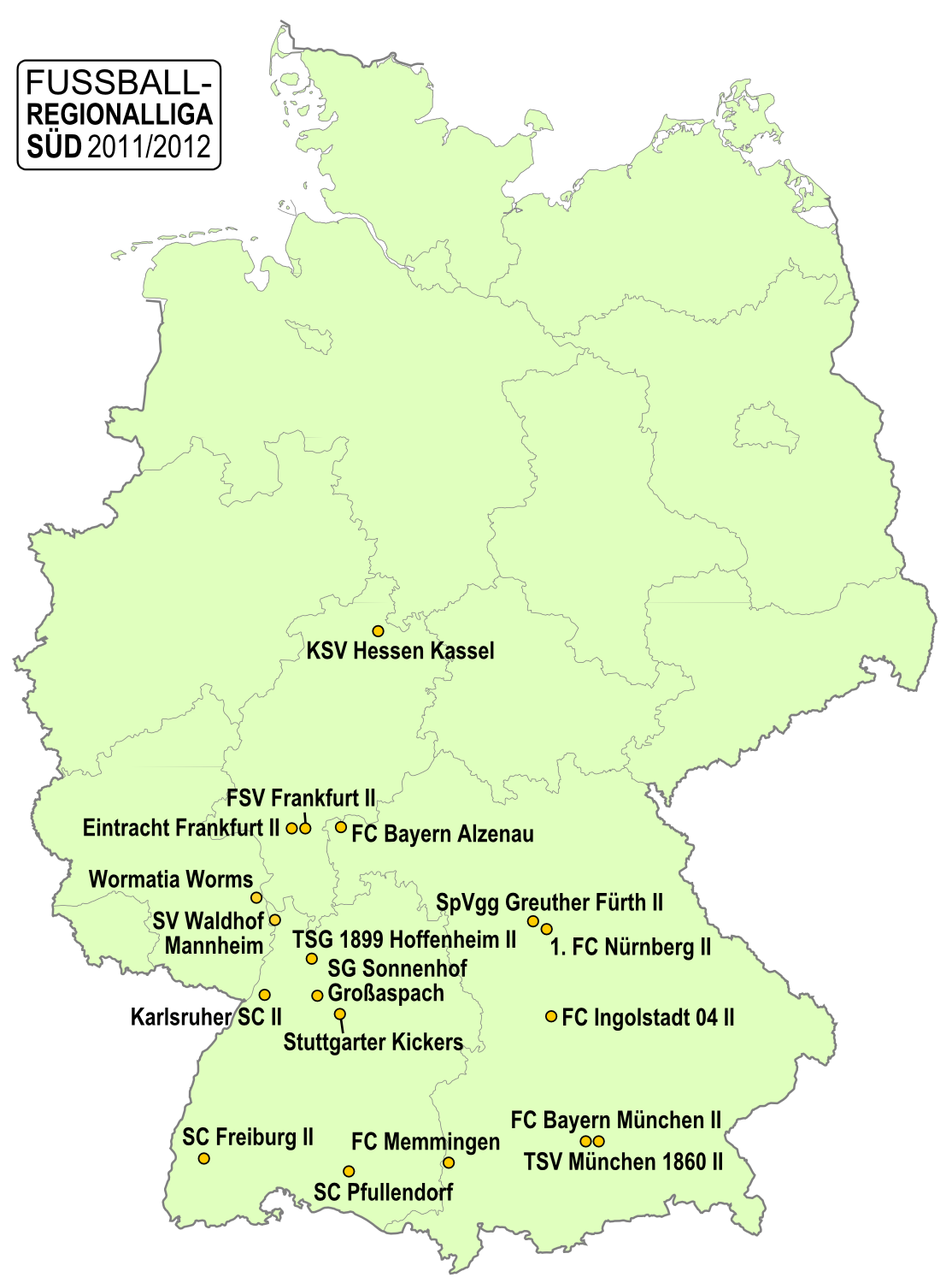 Karte der Vereine der Fußball-Regionalliga Süd, Saison 2011/2012